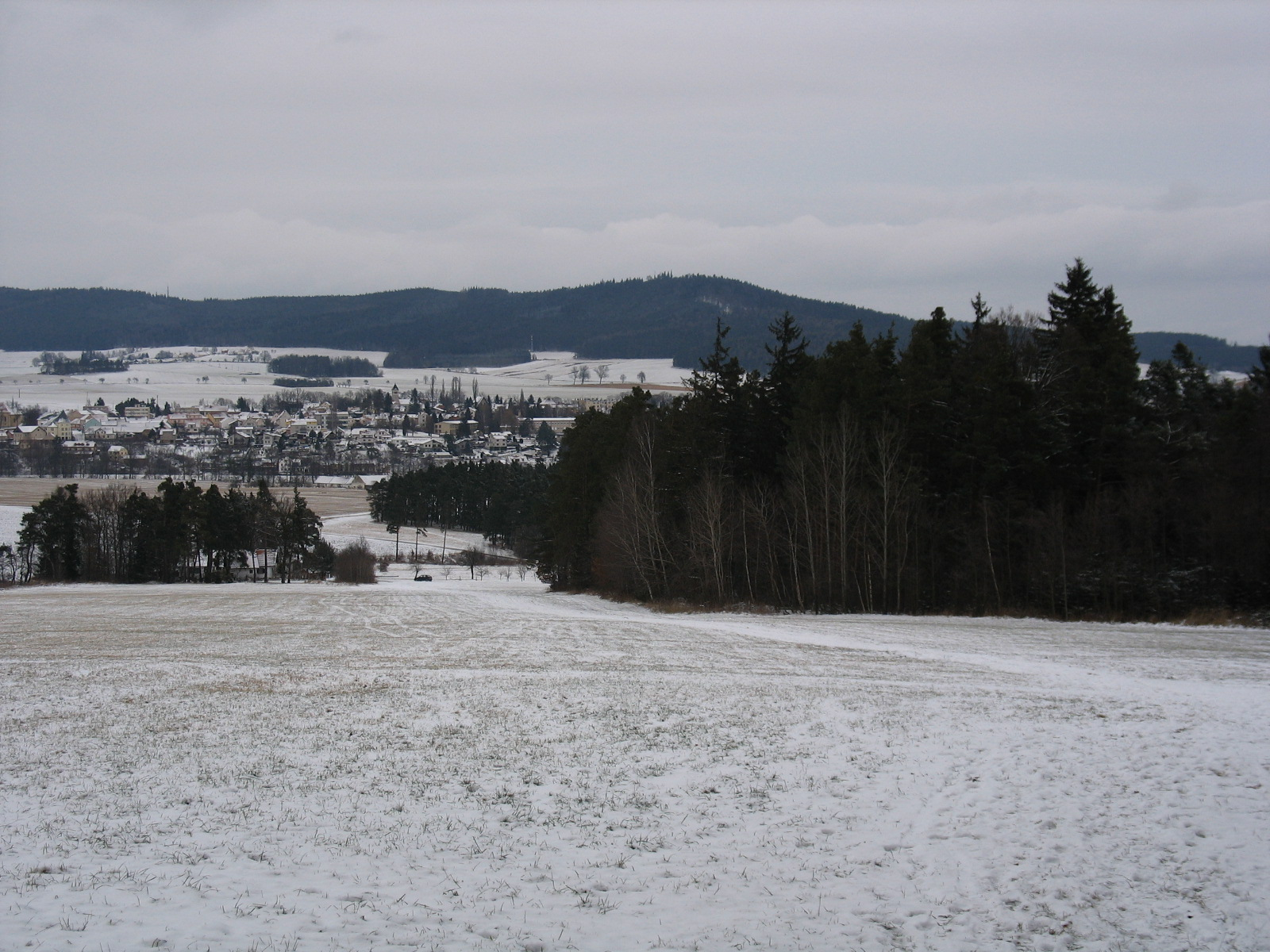 Pohled na městys Křemže a horu Kluk od J